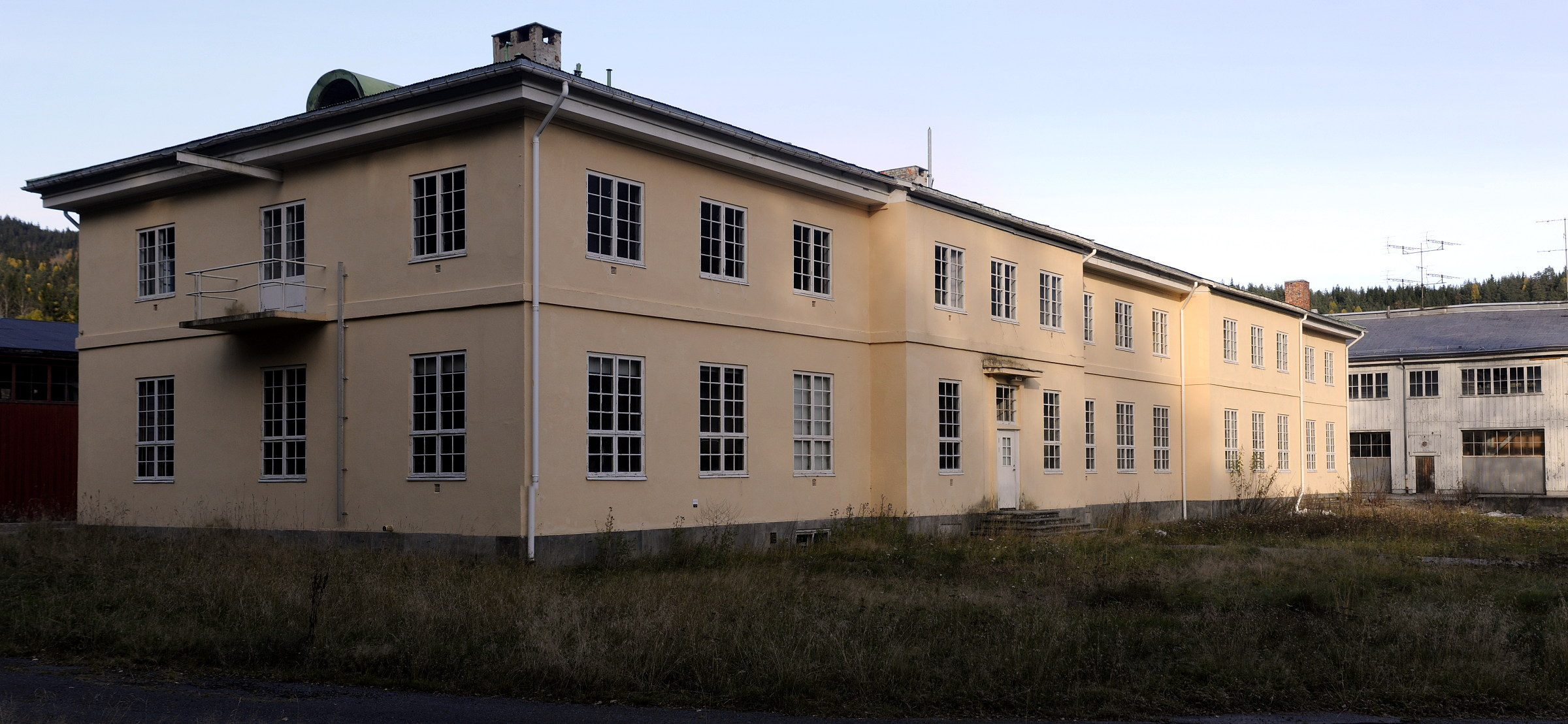 Administrasjonsbygget ved Skar leir